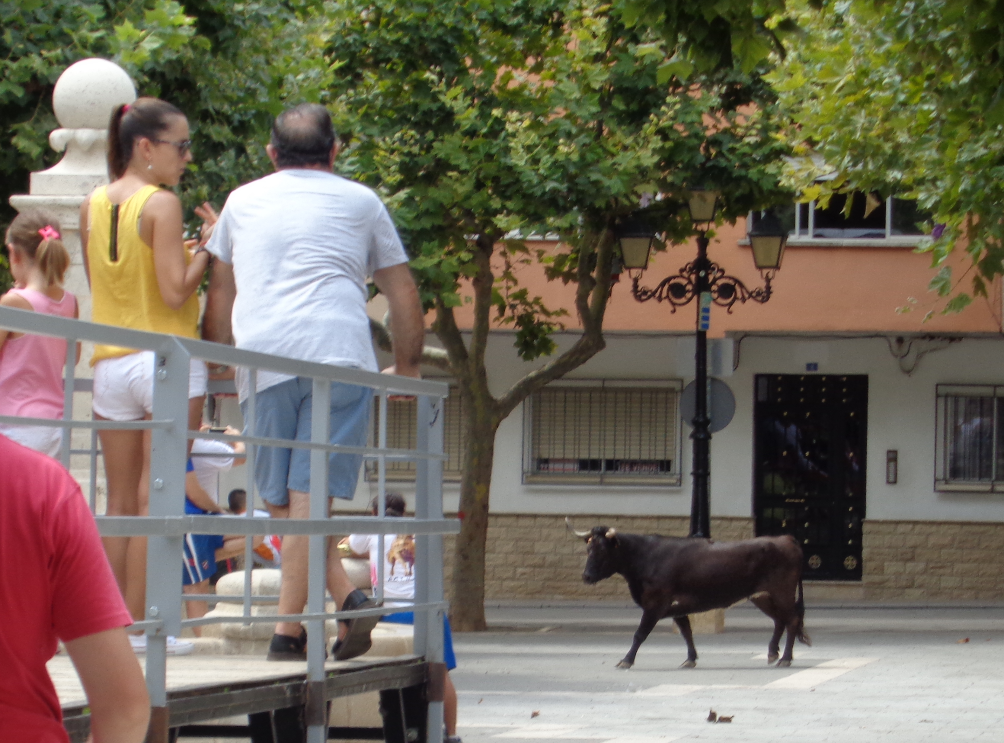 Macastre.